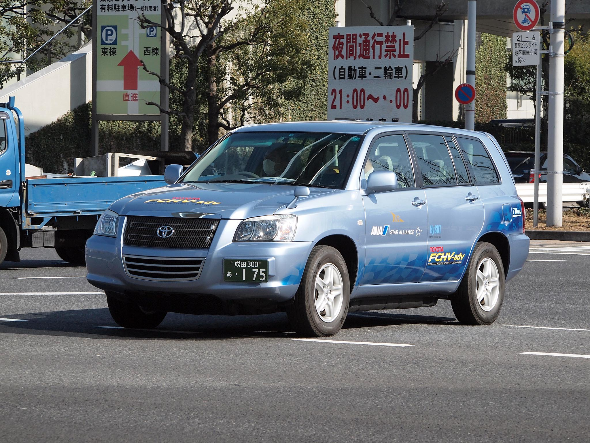 松崎（まんざき）交通のトヨタ・FCHVアドバンスド。水素供給・利用技術研究組合(HySUT)の水素ハイウェイプロジェクトの一環として貸与され、主に全日空国際線利用客を対象とした成田空港発着のハイヤーとして運行される。 登録番号：成田300あ・175 撮影地：東京都江東区、東京ビッグサイト付近